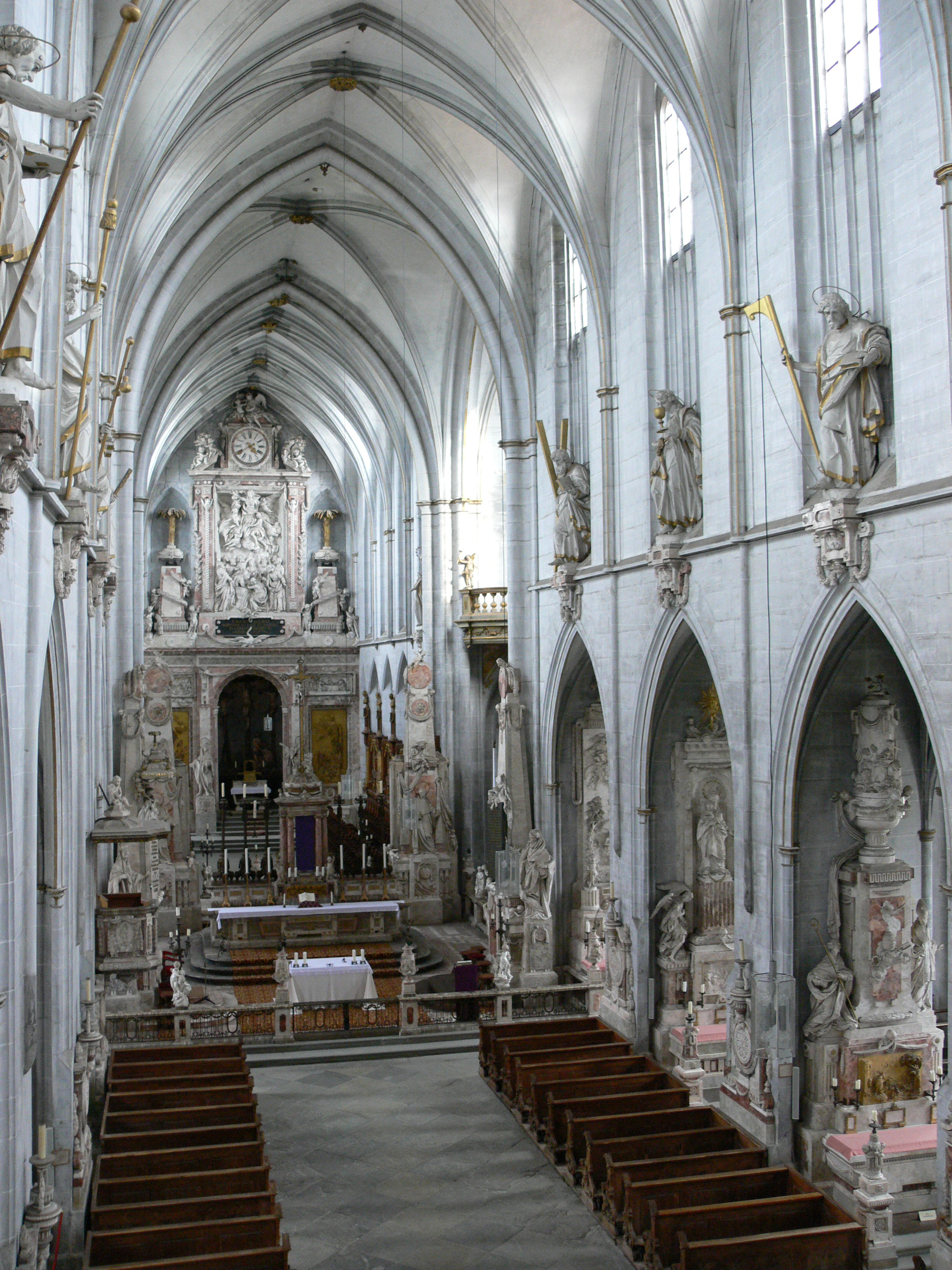 Description: Hauptschiff und Chor Source: User:Saberhagen Location: Salemer Münster, Salem (Baden), Germany Source: own photograph by uploader